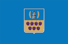 Прапор Недригайлівського району